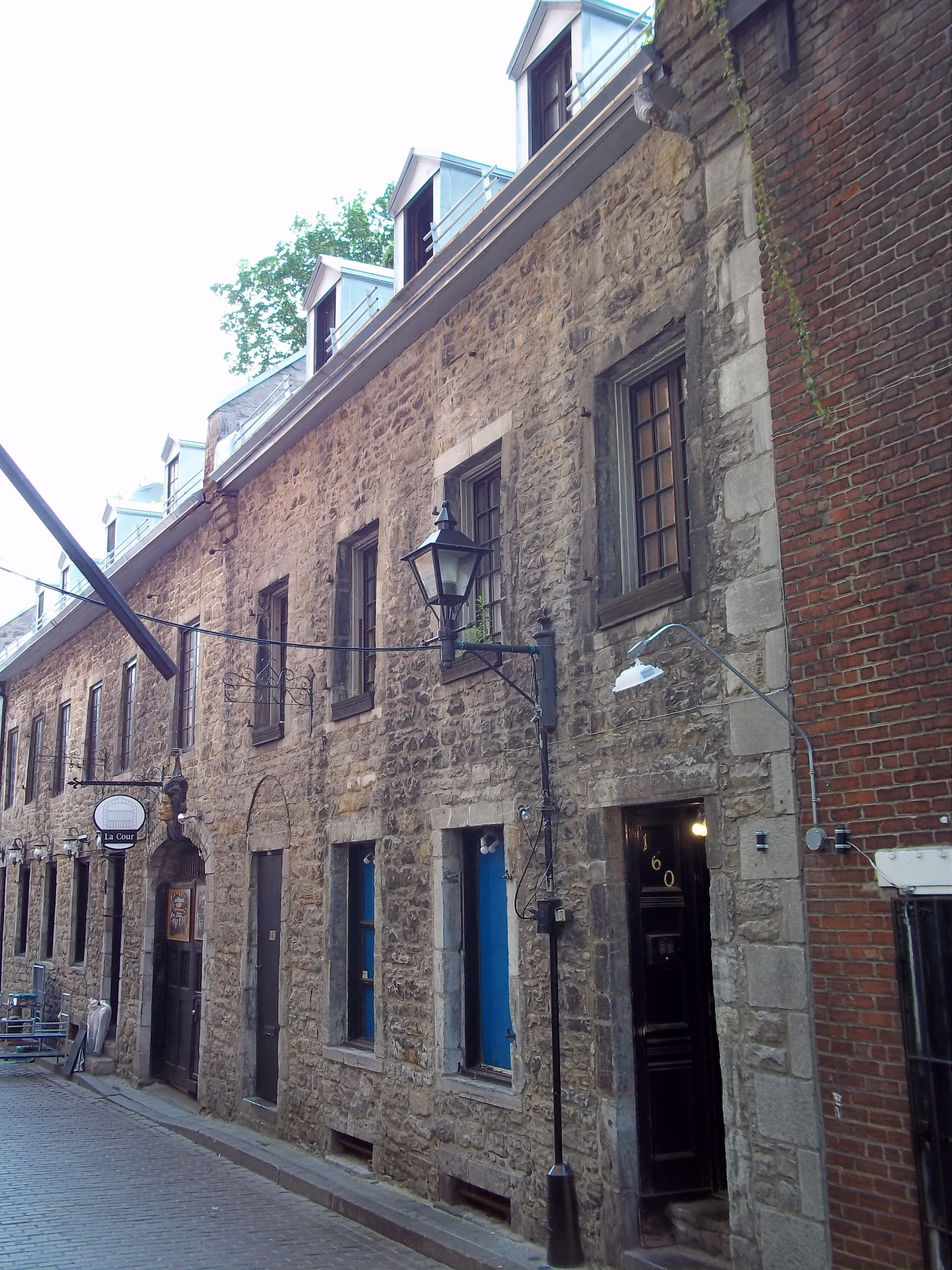 À droite : Maison Marie-Pierre-Viger I, 160-162 rue Saint-Amable, Montréal - info